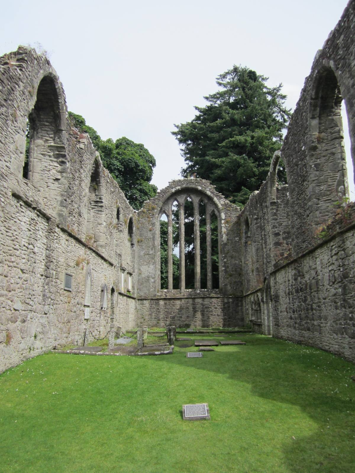 Inchmahome Priory, Lake of Menteith - Scozia